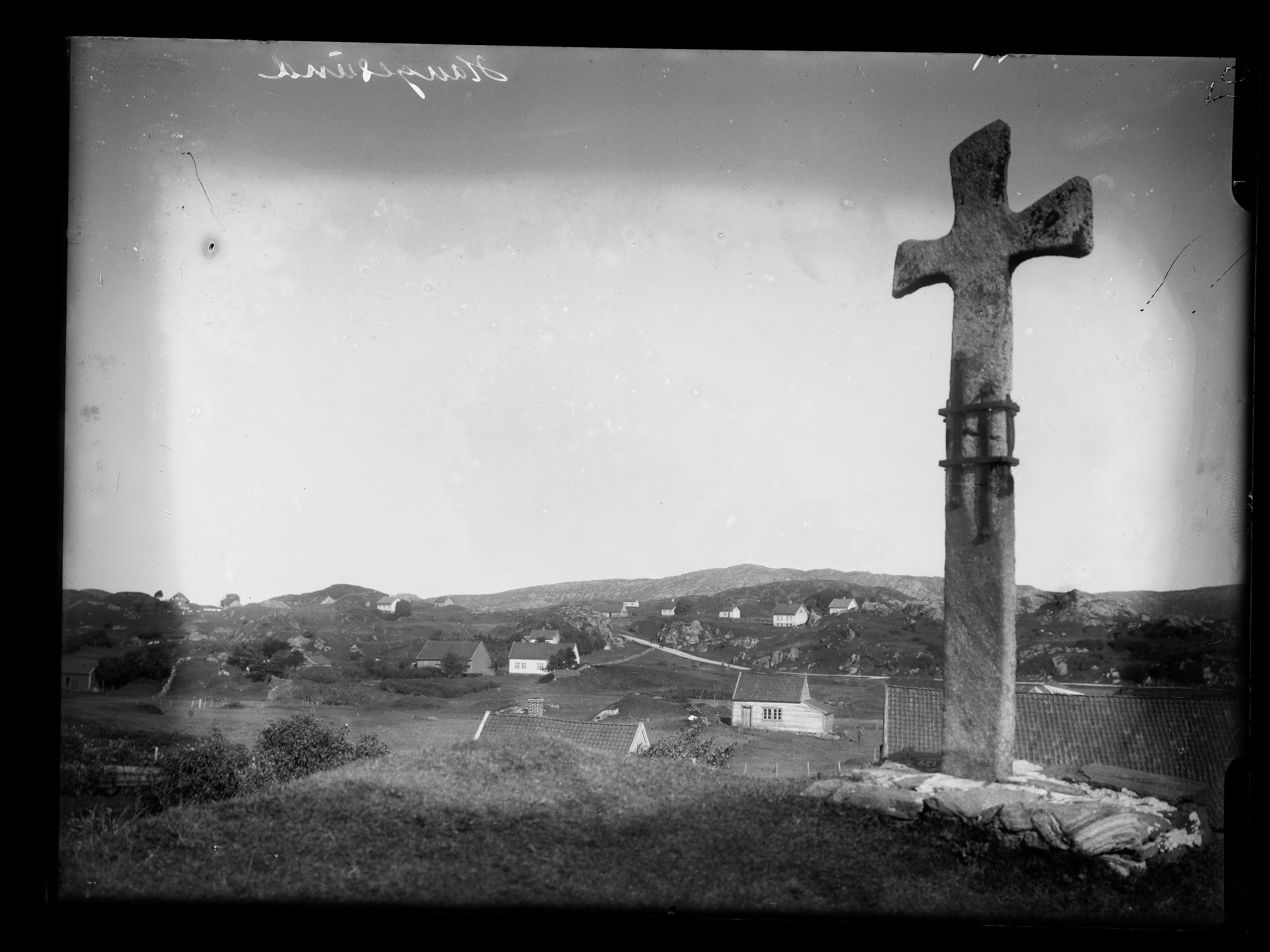 Bildet er hentet fra Nasjonalbibliotekets bildesamling. Anmerkninger til bildet var: Påskrift eske: Haugesund Påskrift negativ: Haugesund Haraldshaugen, Haugesund, Rogaland